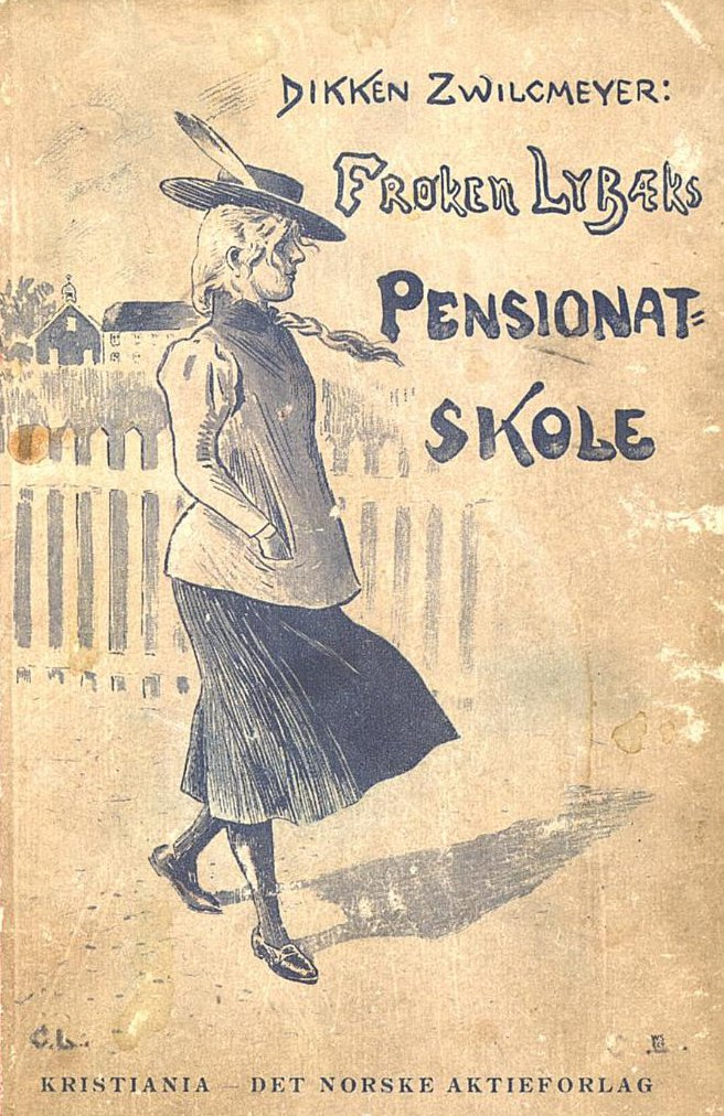 Omslaget til Frøken Lybæks pensionatskole av Dikken Zwilgmeyer, 1901. Tegnet av Gustav Lærum.